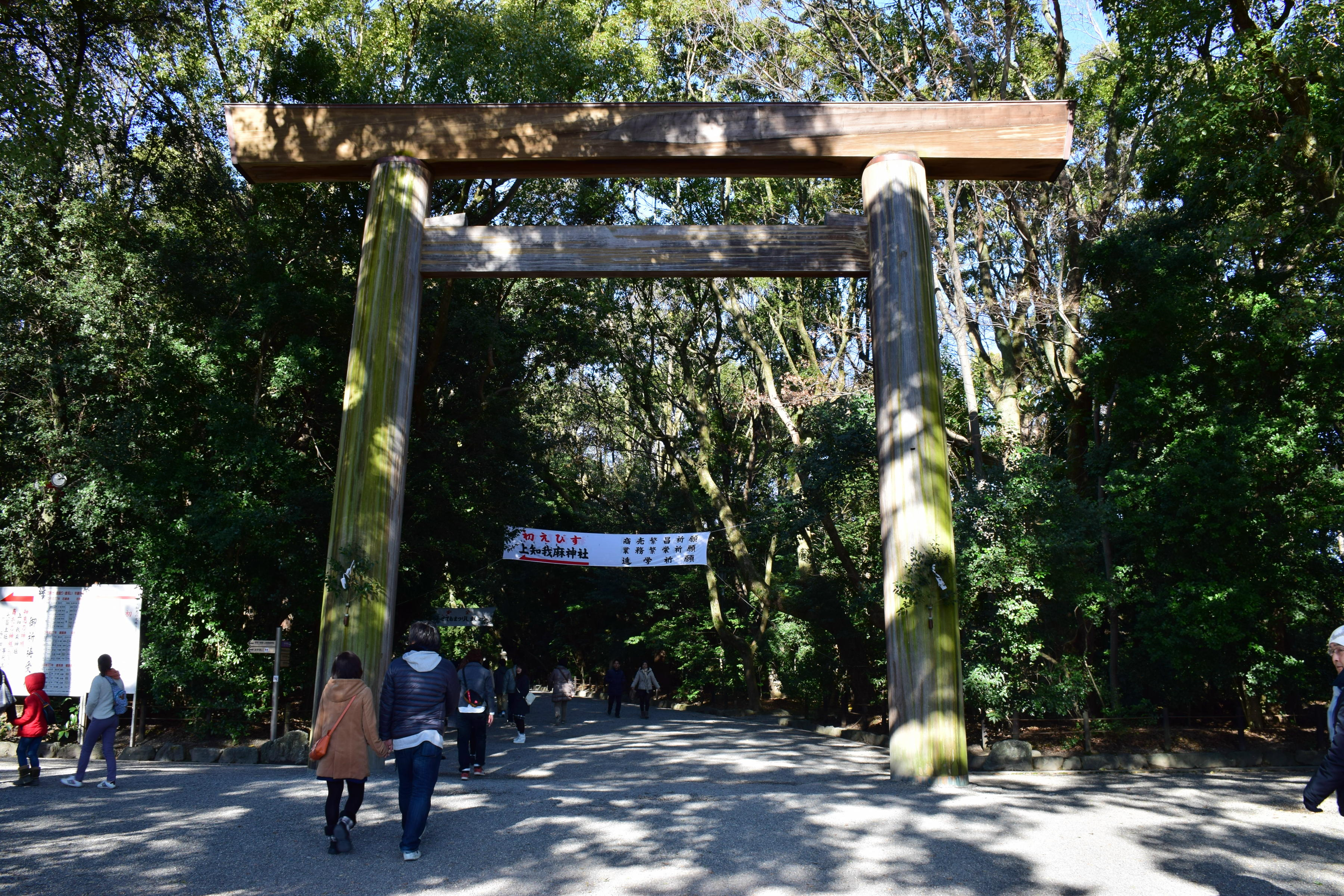 The shrine's torii